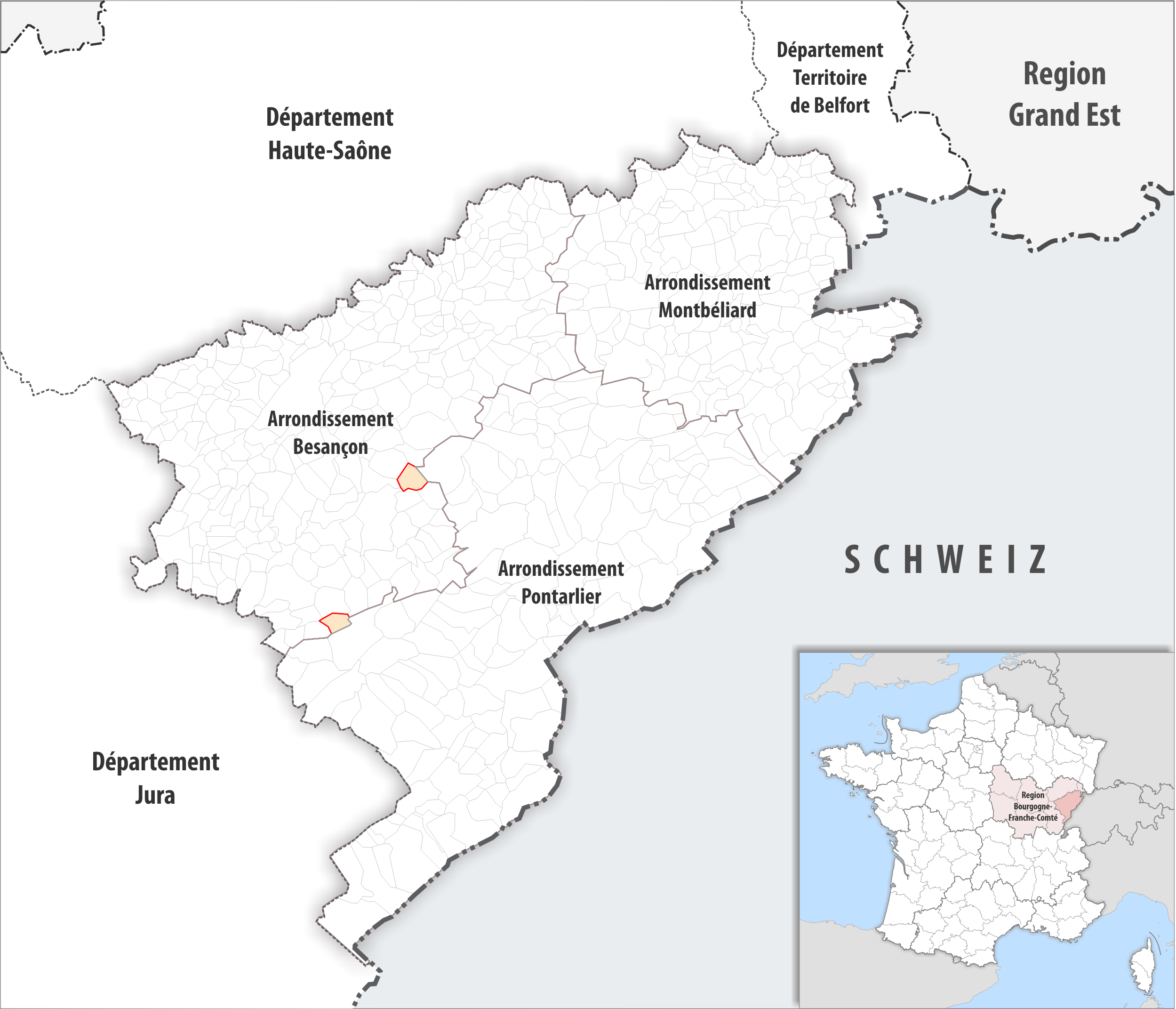 Arrondissements Anpassungen auf 2017 im Departement Doubs